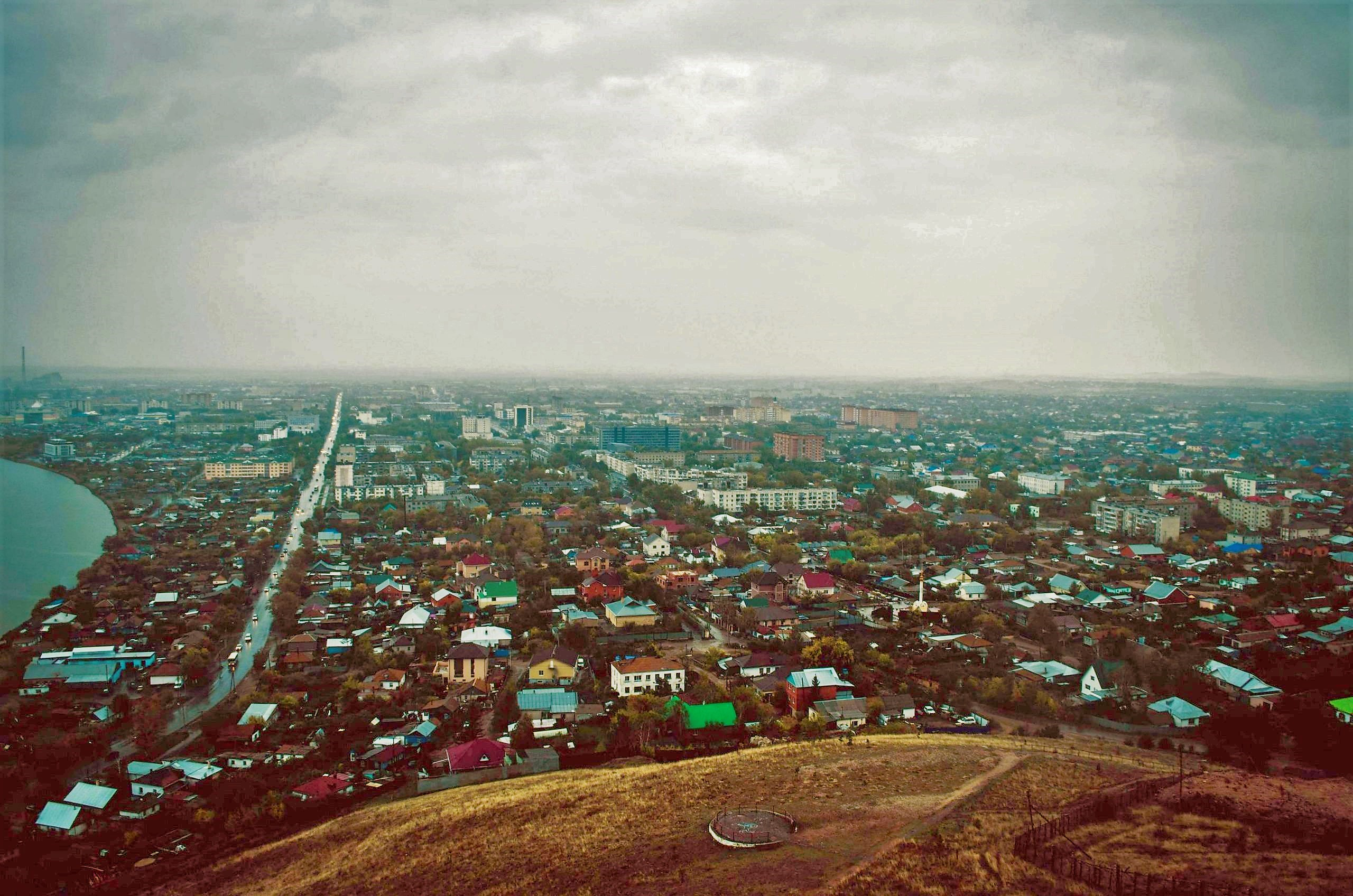 Вид с сопки Букпа